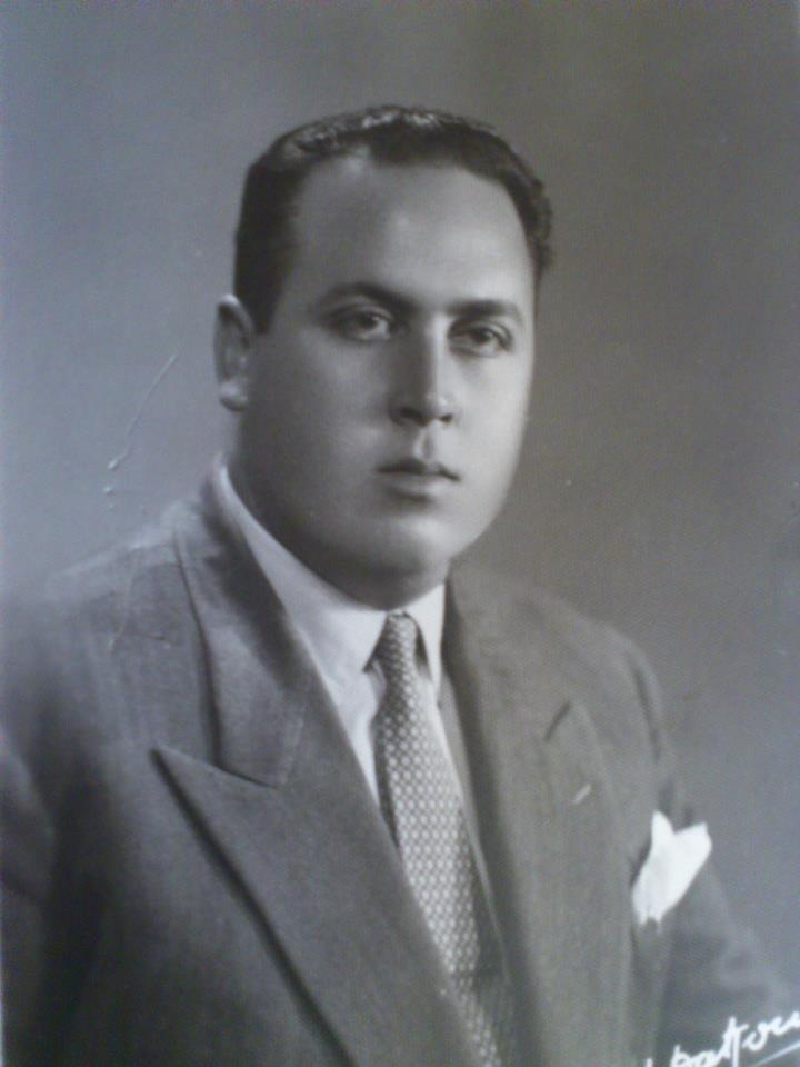 النائب اللبناني السابق: محمد عباس ياغي- من مؤسسي المجلس الإسلامي الشيعي الأعلى - رئيس بلدية بعلبك - نائب في البرلمان اللبناني عام 1968 - من أركان الحزب التقدمي الإشتراكي